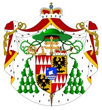 Znak arcibiskupa Theodora Kohna